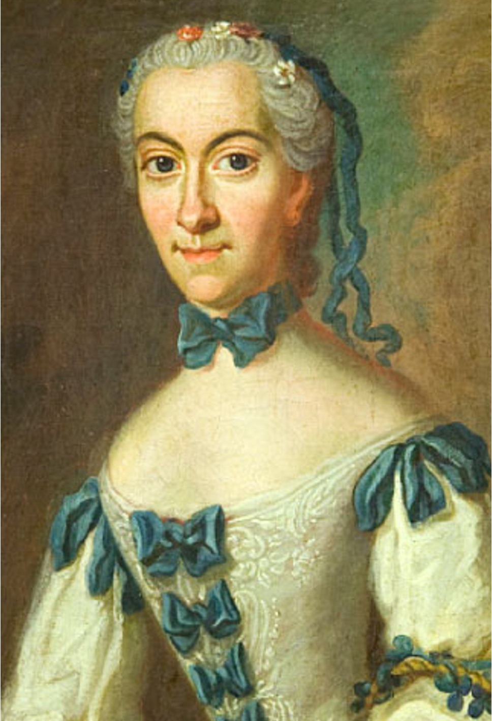 Sofia Eleonora Rosenhane